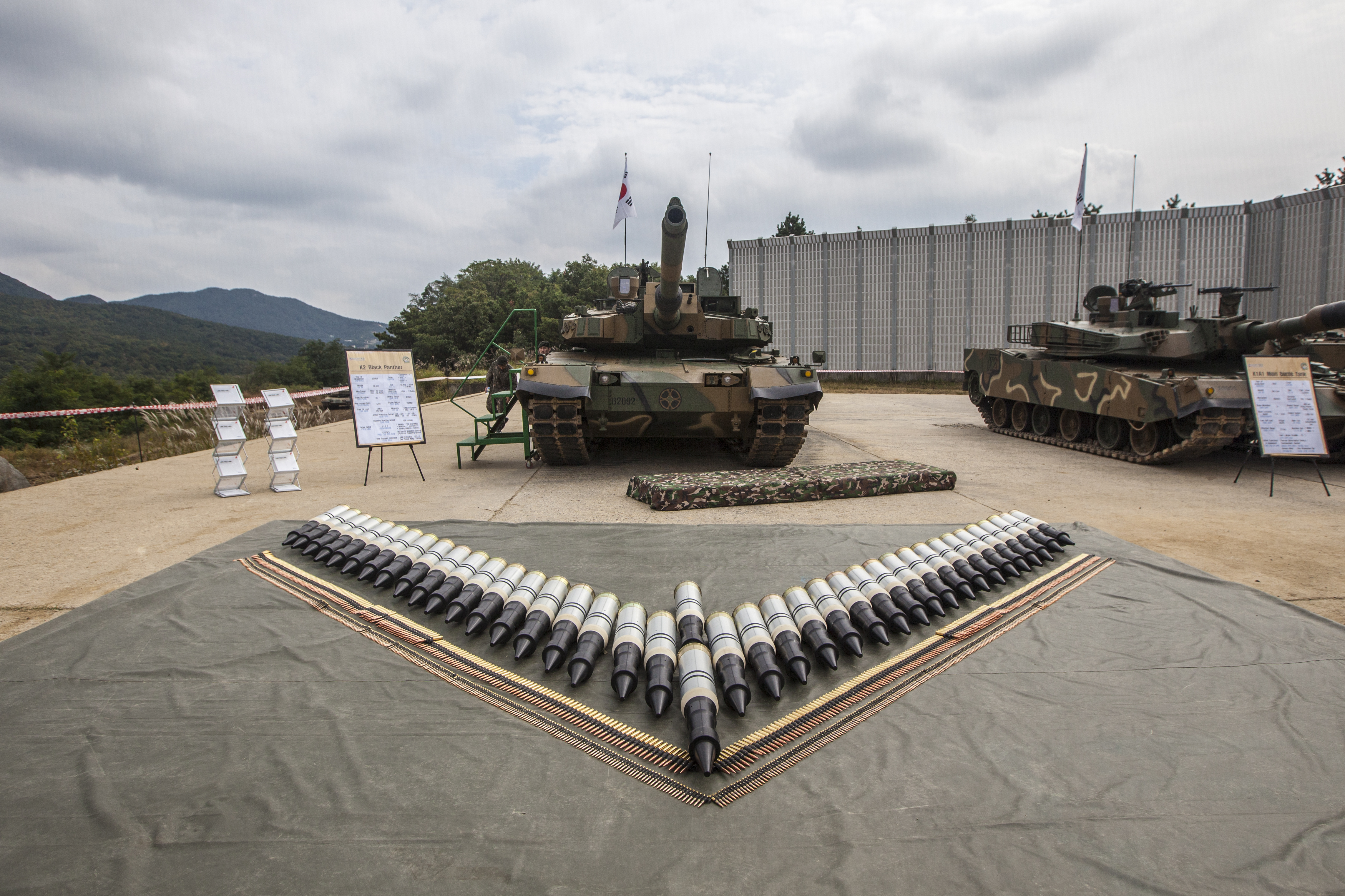 사진 - 정승익 육군 블로그 사진작가